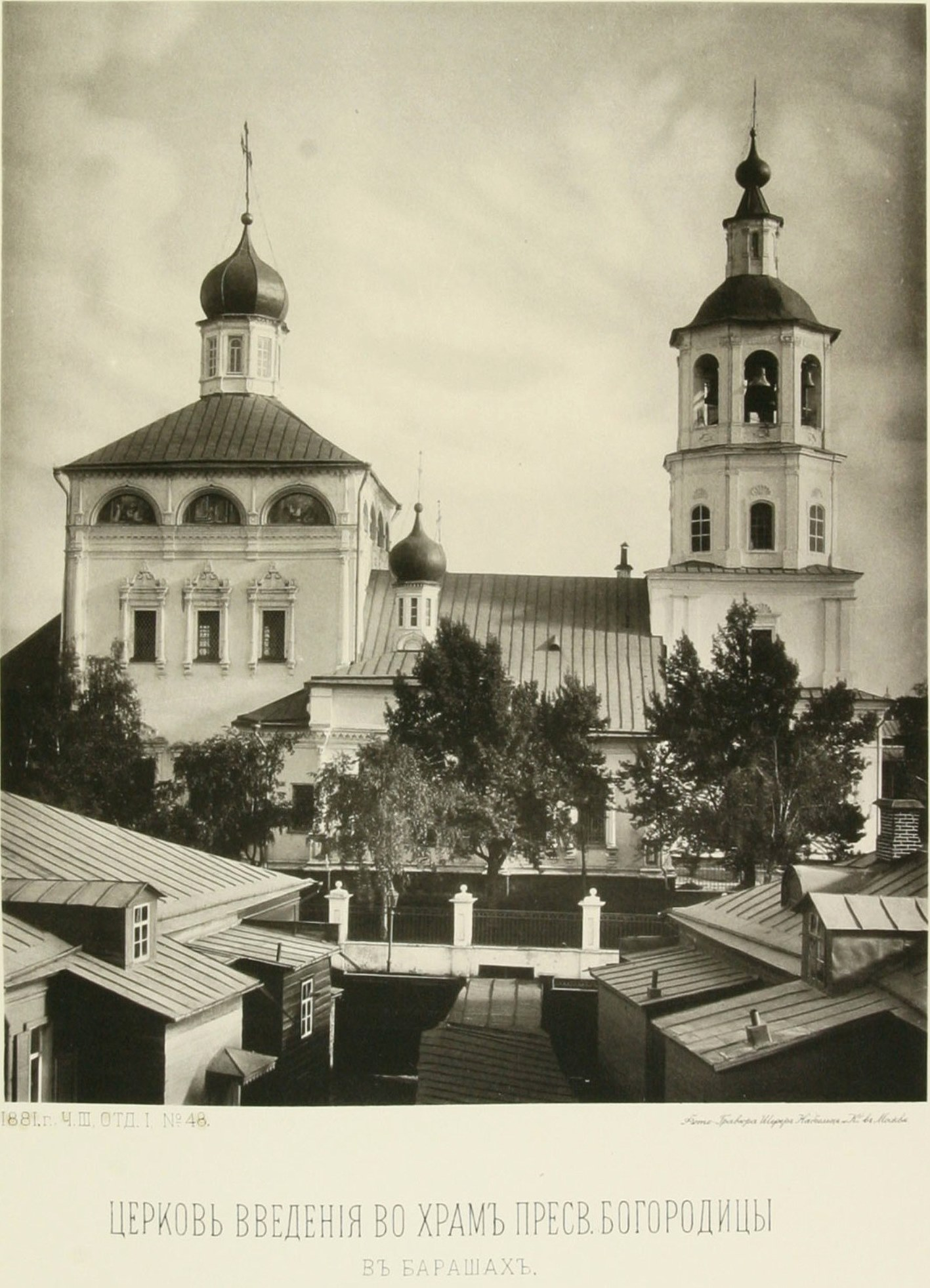 Церковь Введения во храм Пресвятой Богородицы в Барашах